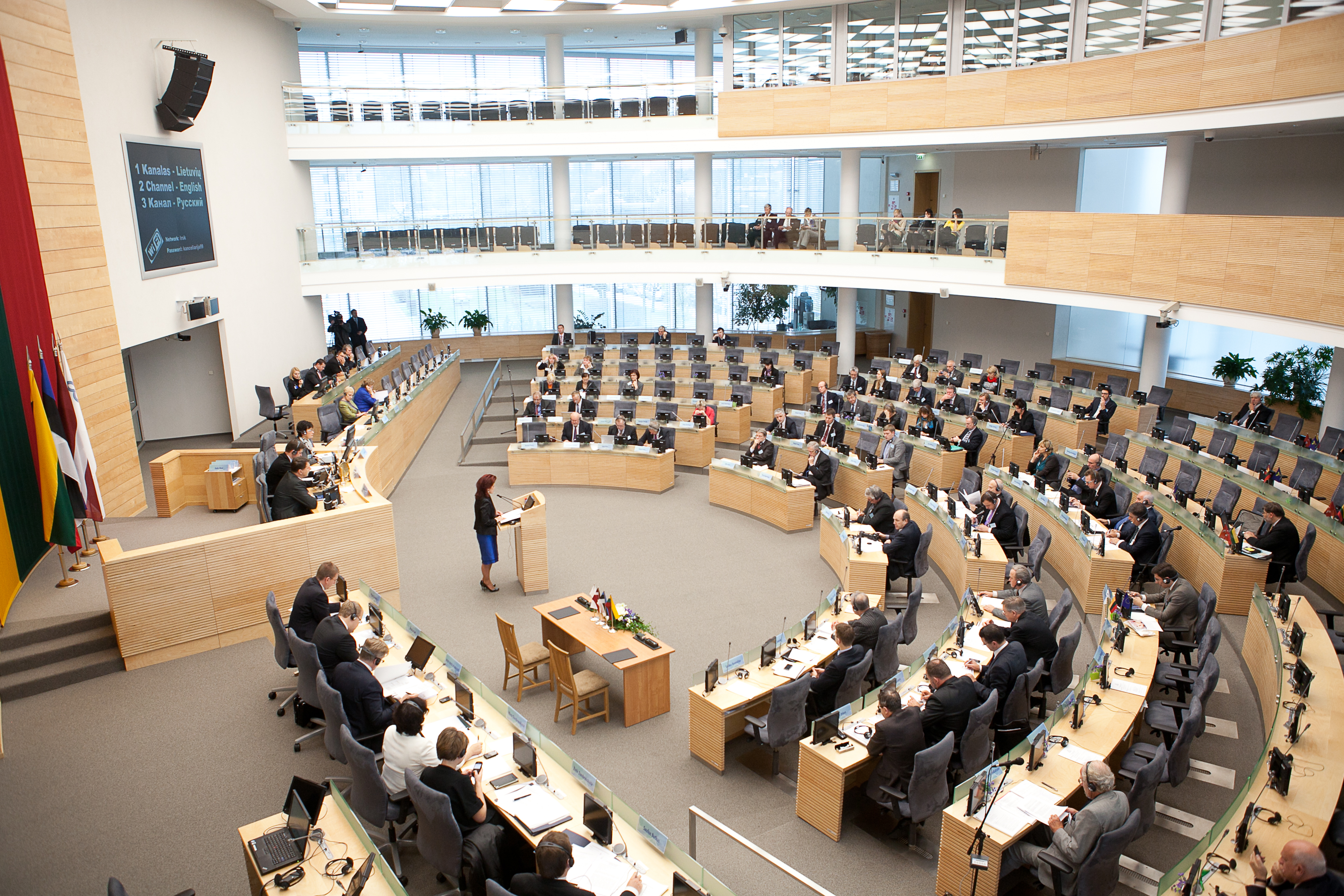 2012.gada 9.novembris. Saeimas deputāti piedalās Baltijas Asamblejas 31.sesijā, kas šogad notiek Lietuvas galvaspilsētā Viļņā. Foto: Ernests Dinka, Saeimas Kanceleja